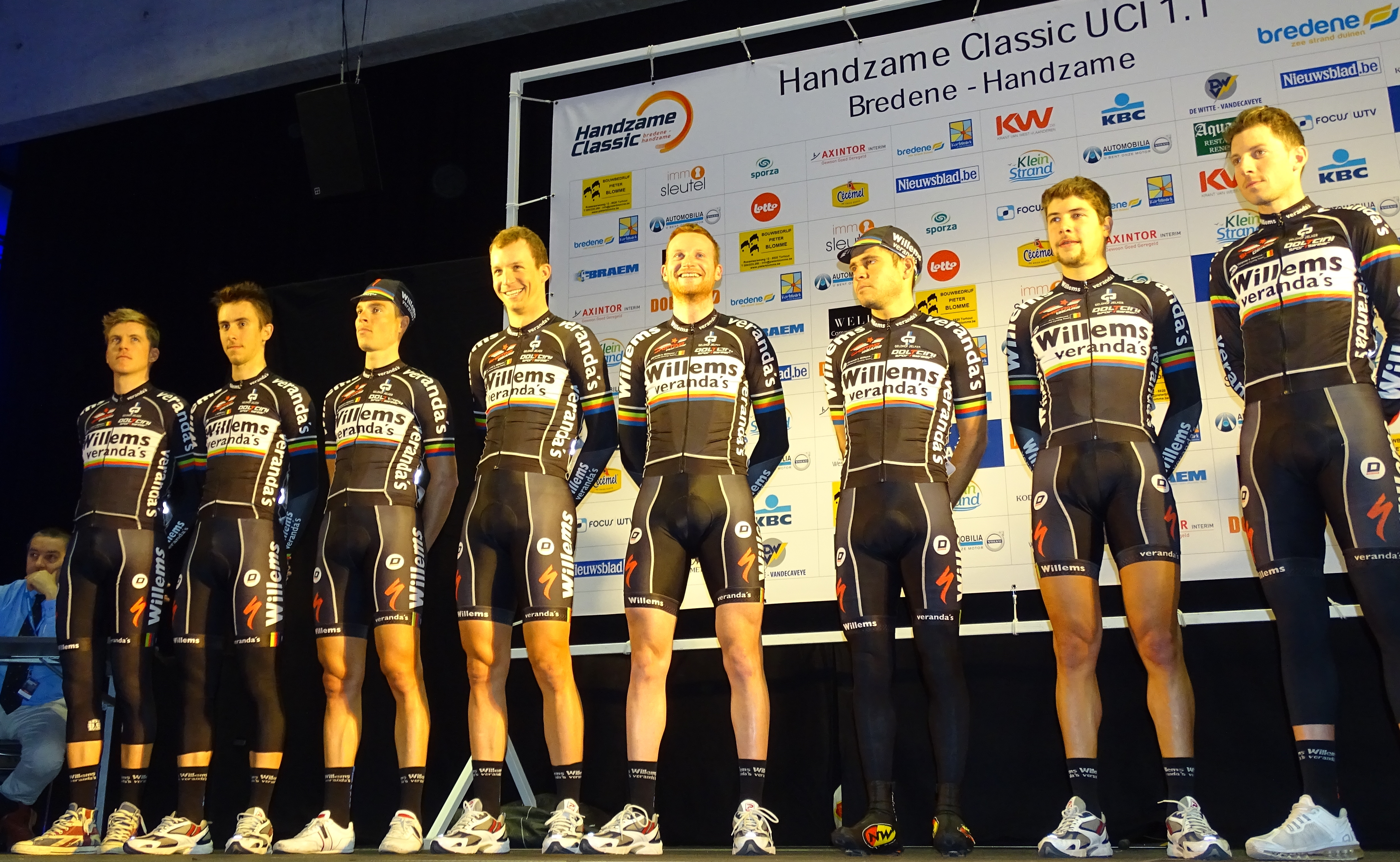 Reportage réalisé le vendredi 20 mars à l'occasion du départ de la Handzame Classic 2015 à Bredene, Belgique.